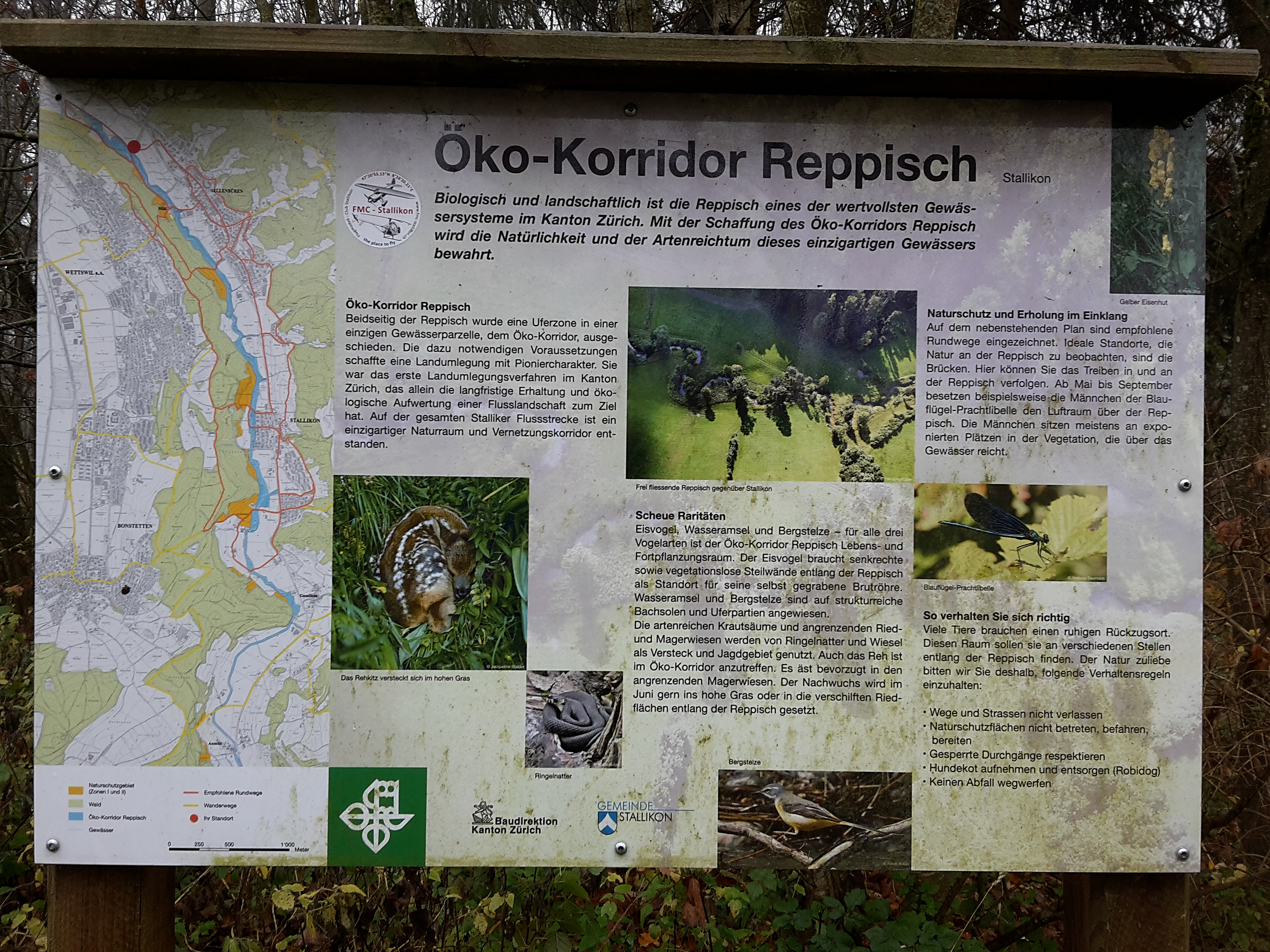 Öko-Korridor Reppisch nahe Sellenbüren, Stallikon